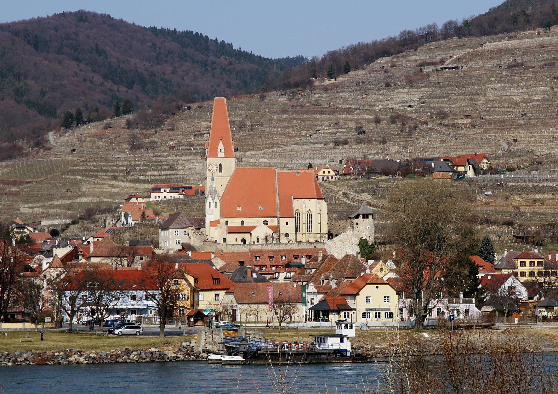 Ortszentrum von der niederösterreichischen Marktgemeinde Weißenkirchen in der Wachau mit der katholischen Pfarrkirche Mariae Himmelfahrt.